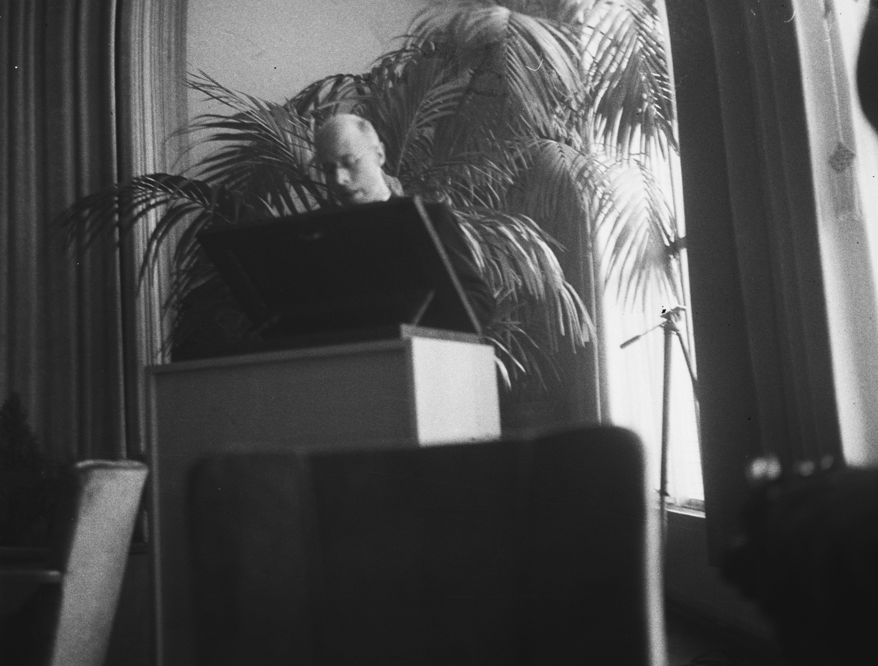 Collectie / Archief : Fotocollectie Anefo Reportage / Serie : Godsdienst : Congres Rooms-Katholieke Actie Beschrijving : Congres van de Katholieke Actie te Utrecht. Toespraak minister-president L.J.M. Beel Datum : 20 september 1945 Locatie : Utrecht (stad) Trefwoorden : congressen, godsdiensten Persoonsnaam : Beel, L.J.M. Fotograaf : Fotograaf Onbekend / Anefo Auteursrechthebbende : Nationaal Archief Materiaalsoort : Negatief (zwart/wit) Nummer archiefinventaris : bekijk toegang 2.24.01.03 Bestanddeelnummer : 900-8263